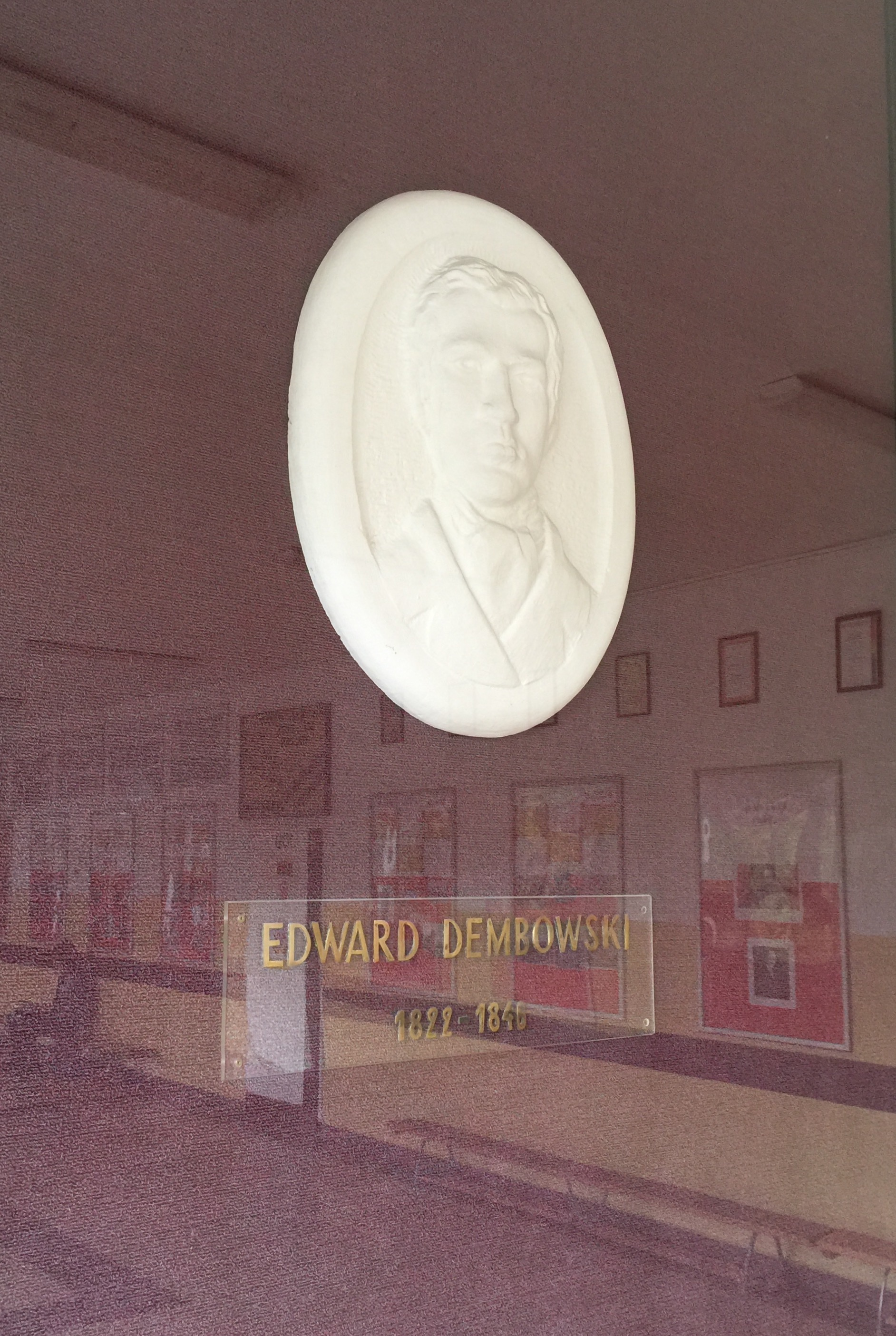 Wizerunek patrona szkoły